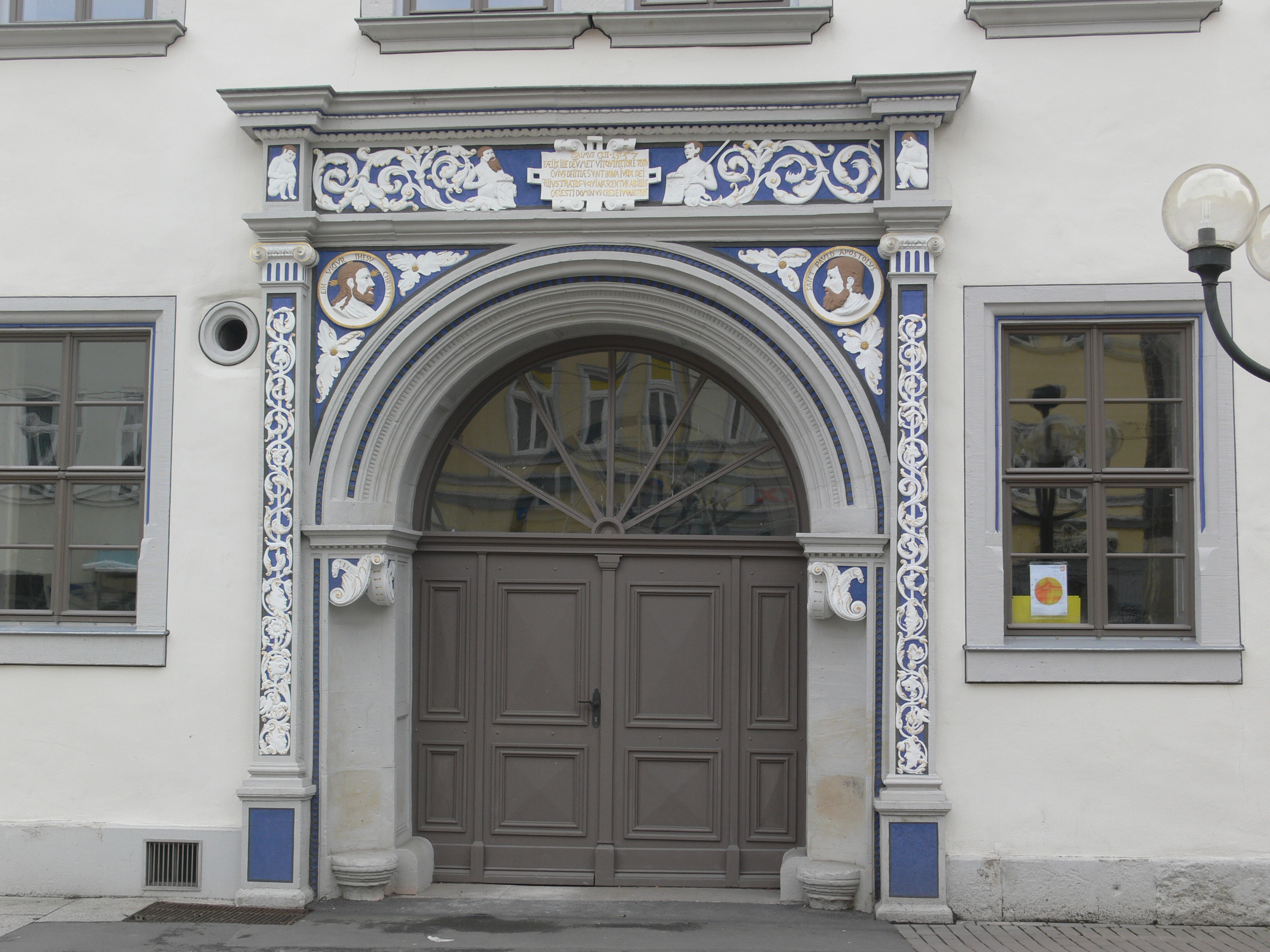 Haus Dacheröden am Anger in Erfurt